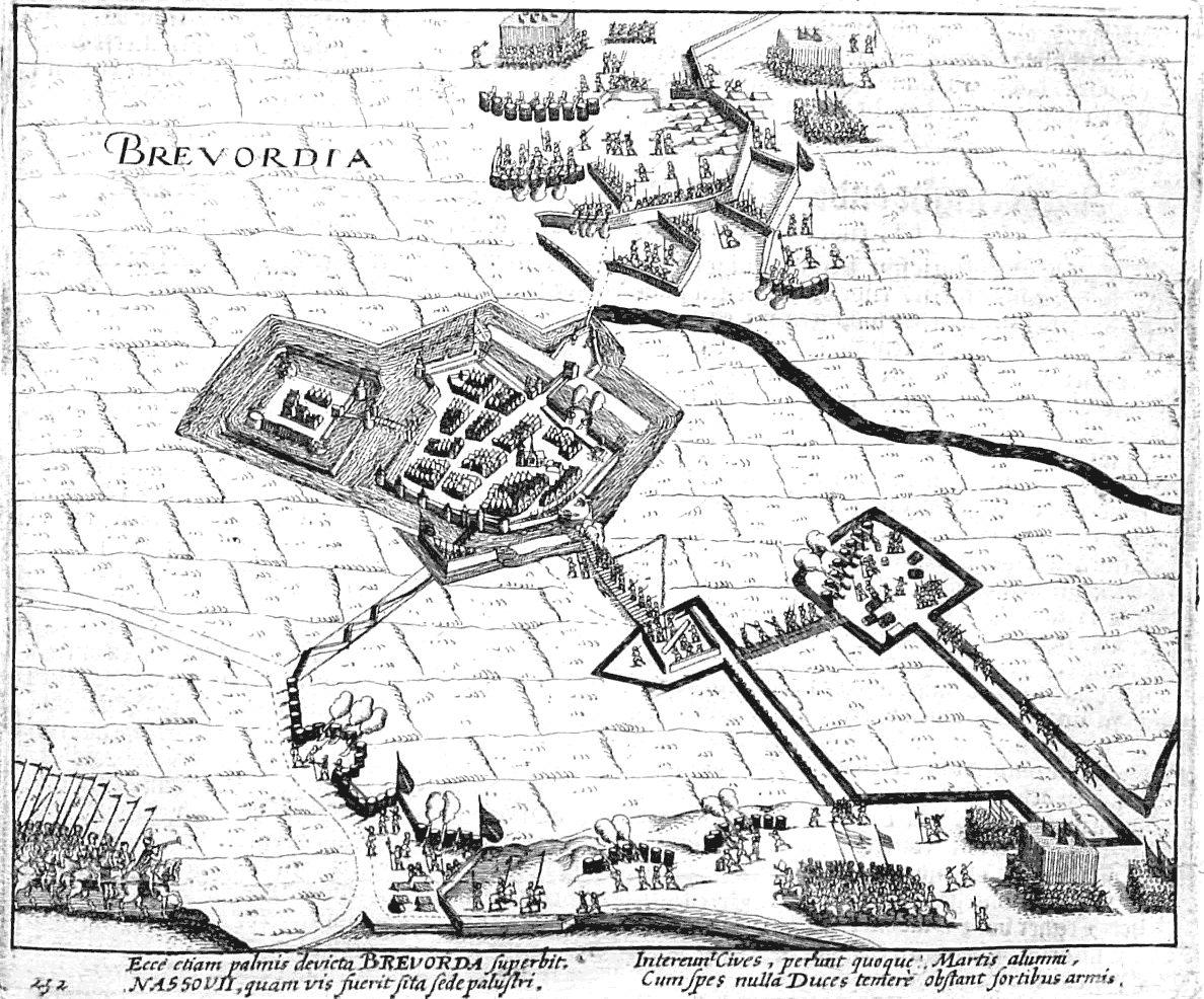 Belegering van Bredevoort in 1597, uit zeventiende eeuws boek dus vrij van auteursrecht.